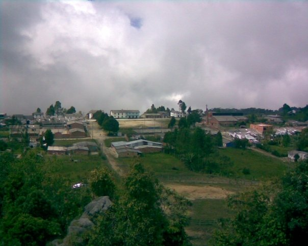 Vista desde el tanque del pueblo